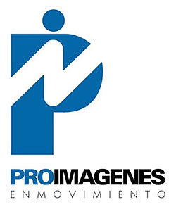 Proimagenes primer logo entidad